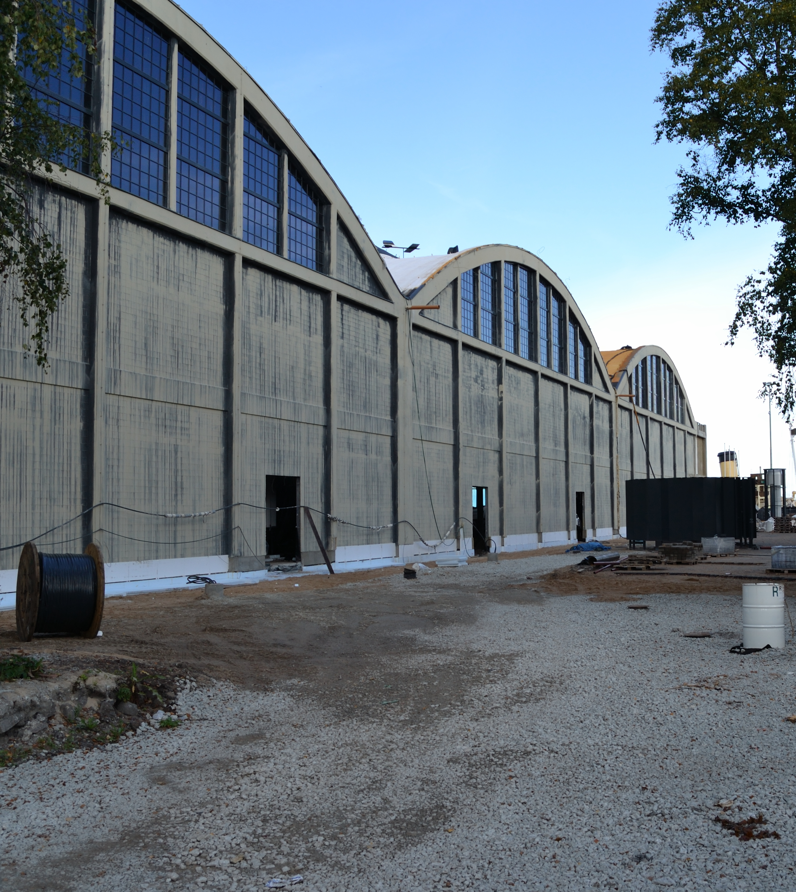 Tallinn, Tallinna vesilennukite angaarid, 1916-1917